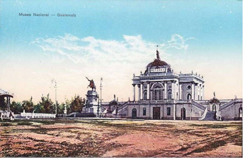 Palacio de la Reforma en 1915